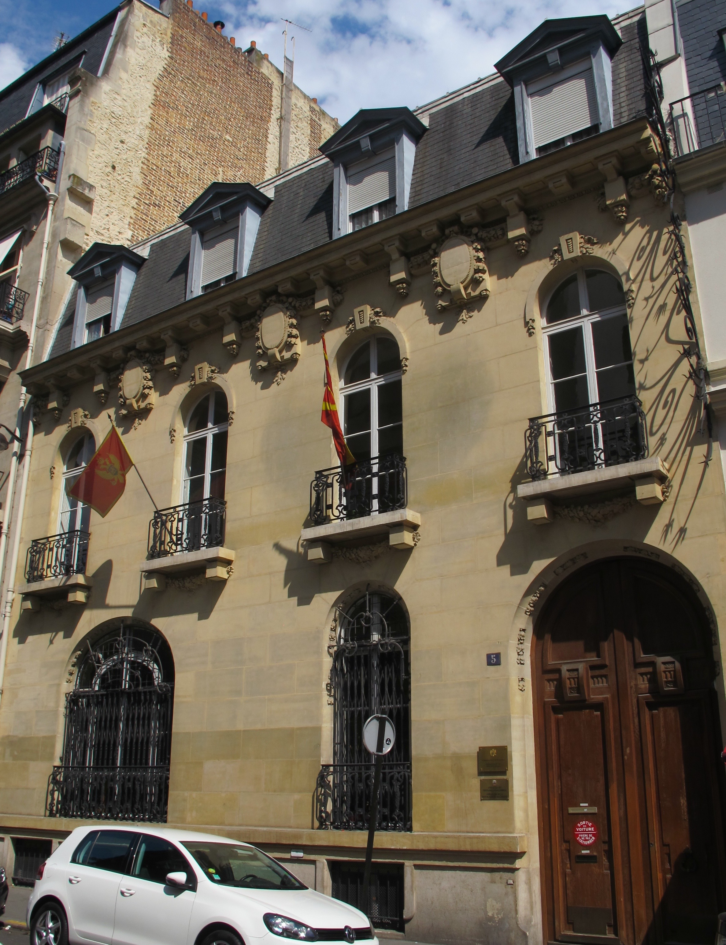 Ambassade de Macédoine en France, 5 rue de la Faisanderie (Paris, 16e).